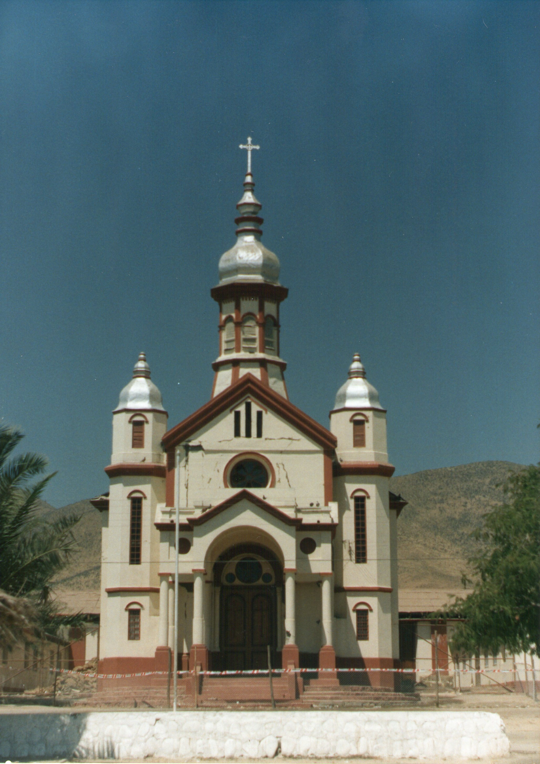 Iglesia de Sotaquí (1998)